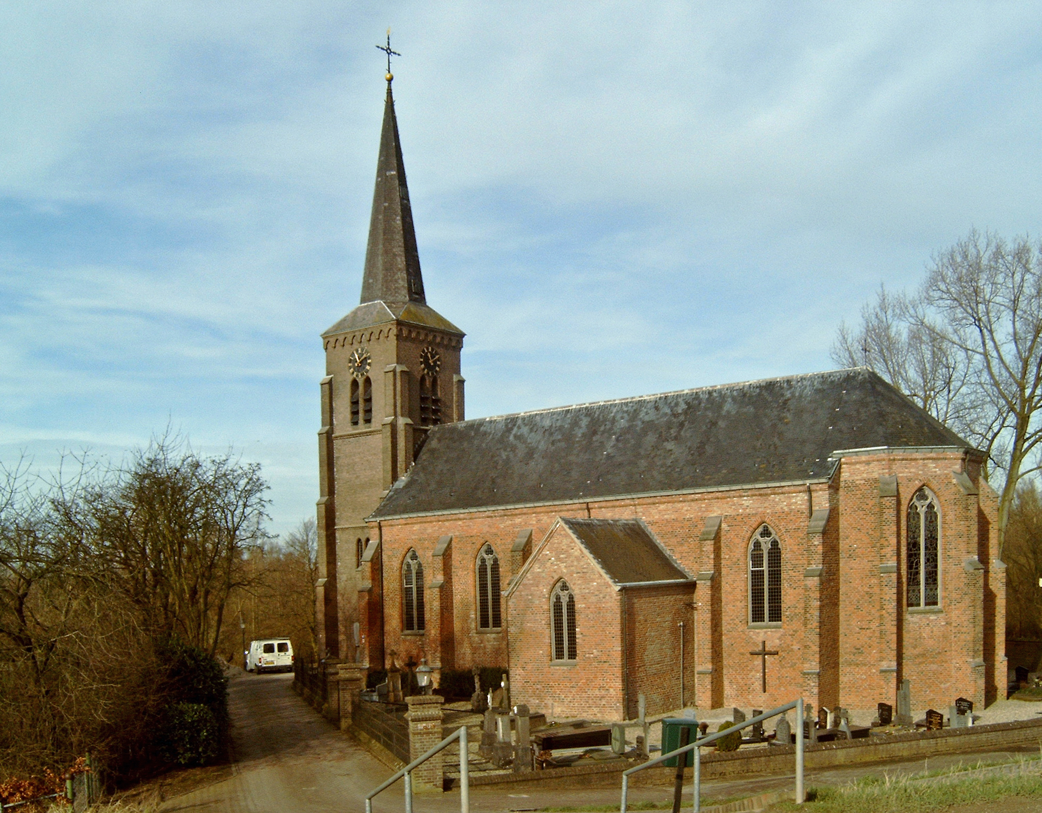 Kekerdom, kerk